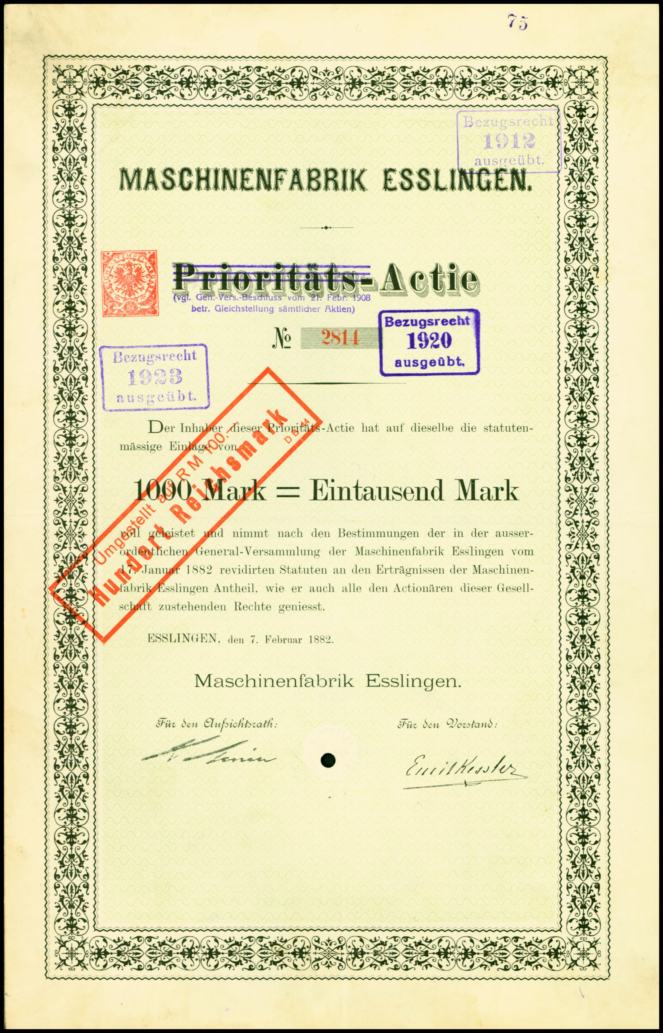 Aktie über 1000 Mark der Maschinenfabrik Esslingen vom 7. Februar 1882; aus dem Fundus des Ersten Deutschen Historic-Actien-Museum e.V. (EDHAM), Kürnbach